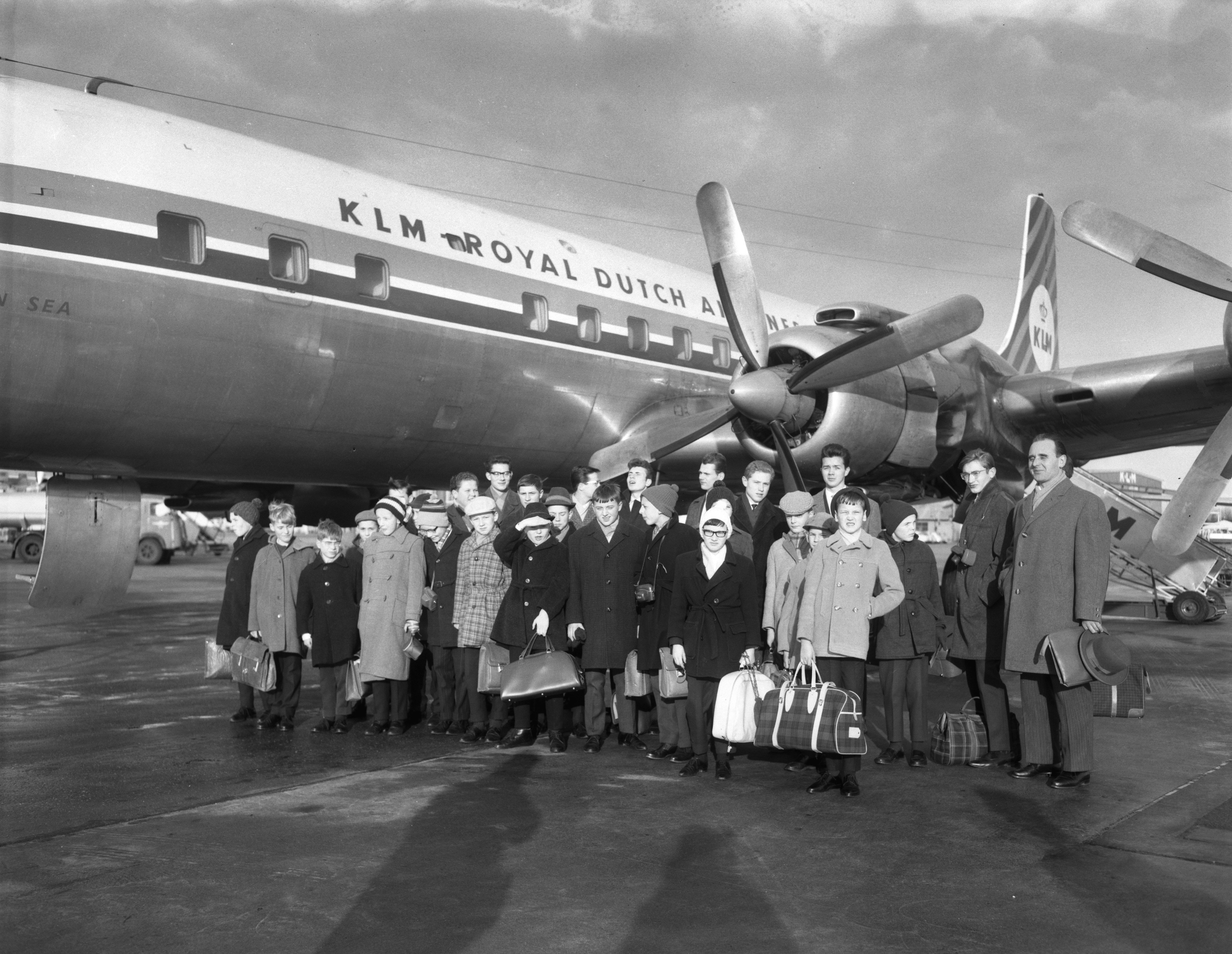 Collectie / Archief : Fotocollectie Anefo Reportage / Serie : [ onbekend ] Beschrijving : Wiener Sangerknaben in Nederland Datum : 17 december 1962 Fotograaf : Koch, Eric / Anefo Auteursrechthebbende : Nationaal Archief Materiaalsoort : Negatief (zwart/wit) Nummer archiefinventaris : bekijk toegang 2.24.01.04 Bestanddeelnummer : 914-6184